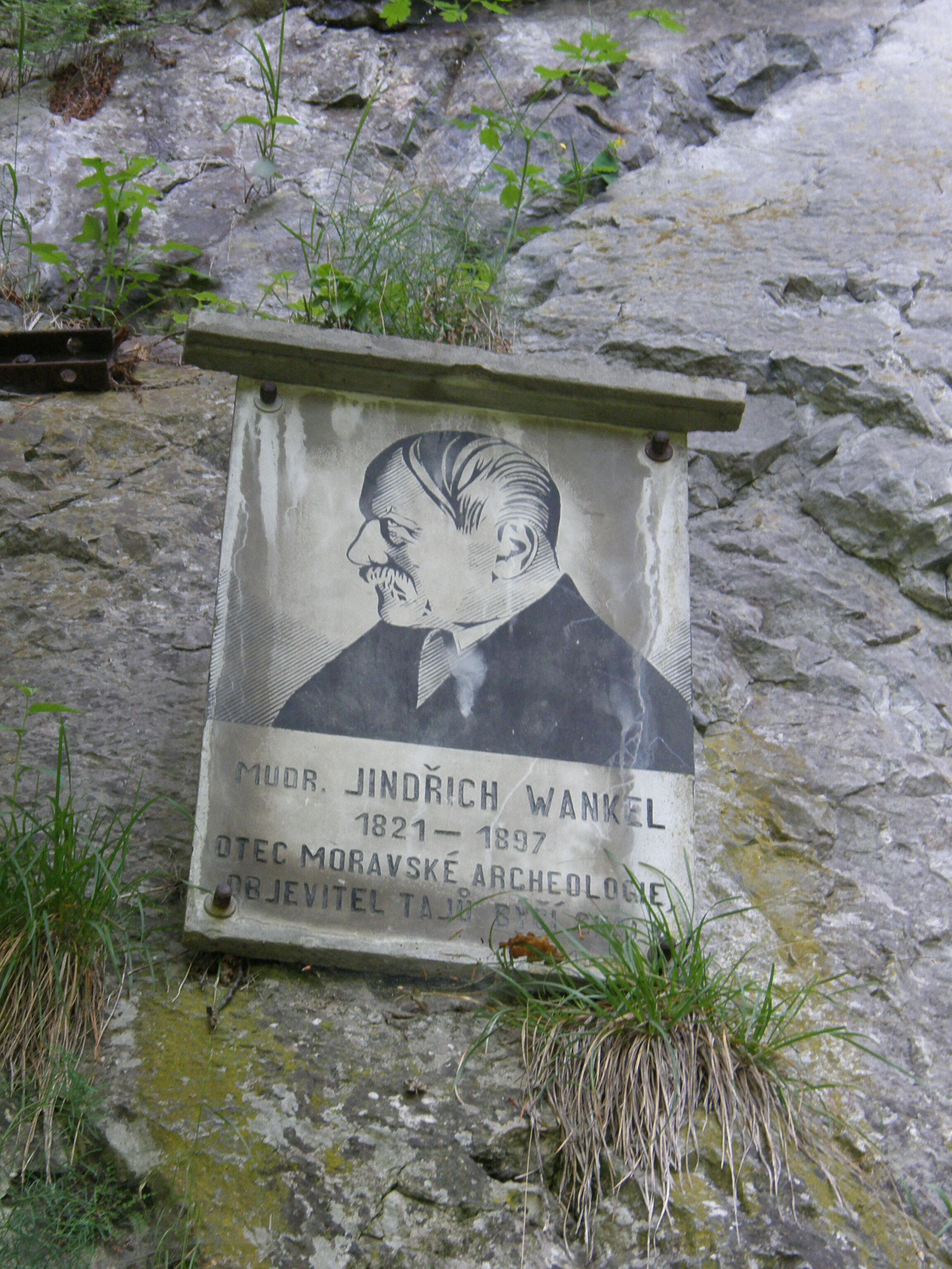 Podobizna J. Wankela na stěně Býčí skály